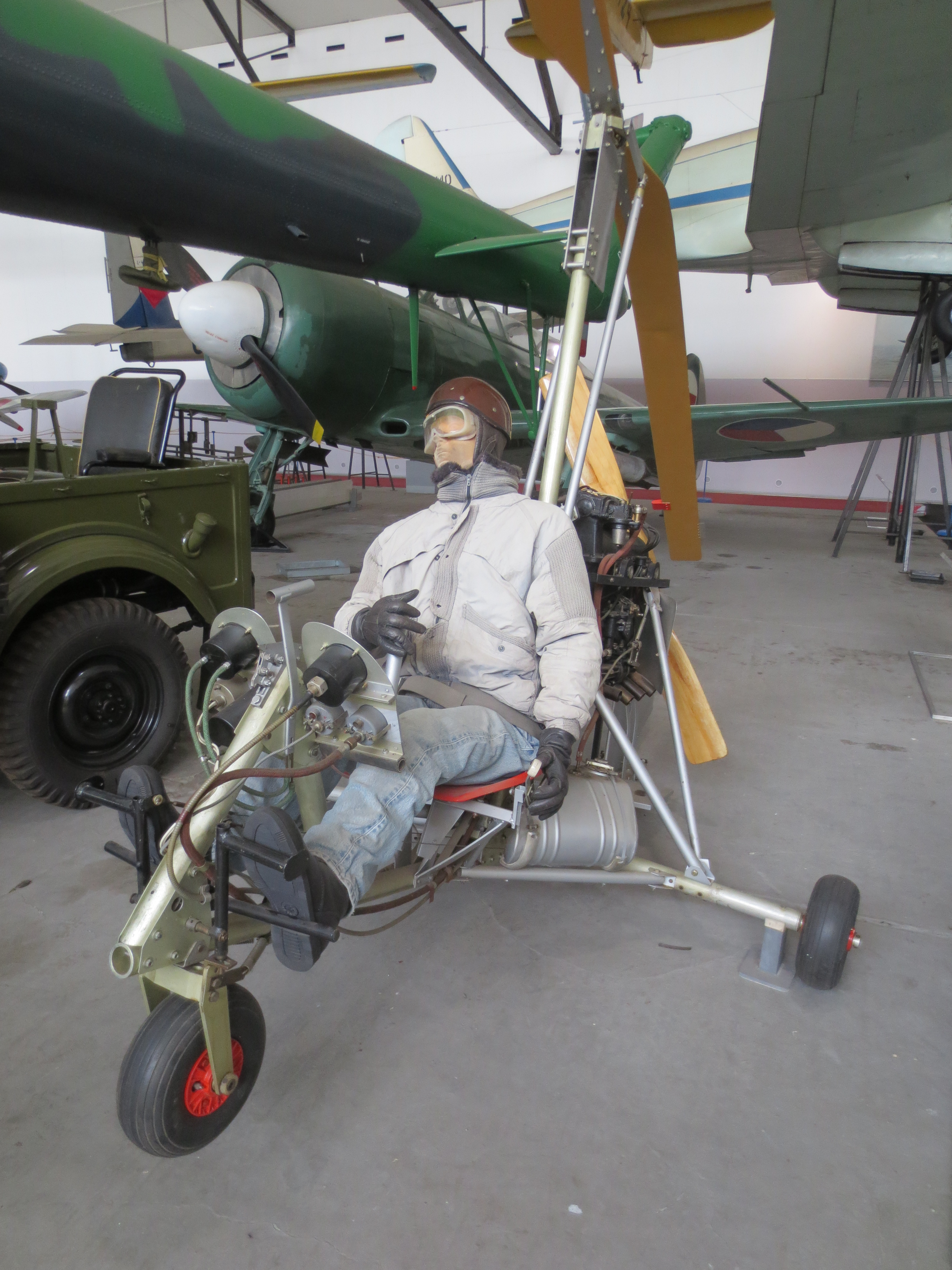 Vírník KD-67 Ideal s motorem Walter Mikron II, LM Kbely